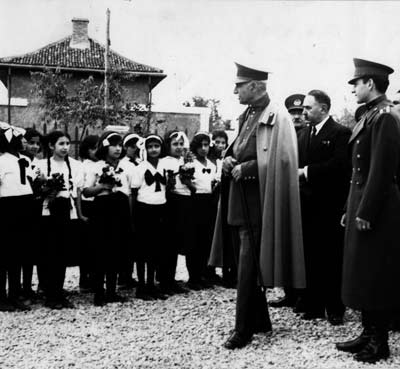 "Kashfe Hijab" by RezaKhan